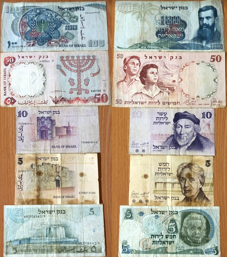 100 לירות ישראליות משנת 1968 50 לירות ישראליות משנת 1960 10 לירות ישראליות משנת 1973 5 לירות ישראליות משנת 1973 5 לירות ישראליות משנת 1968